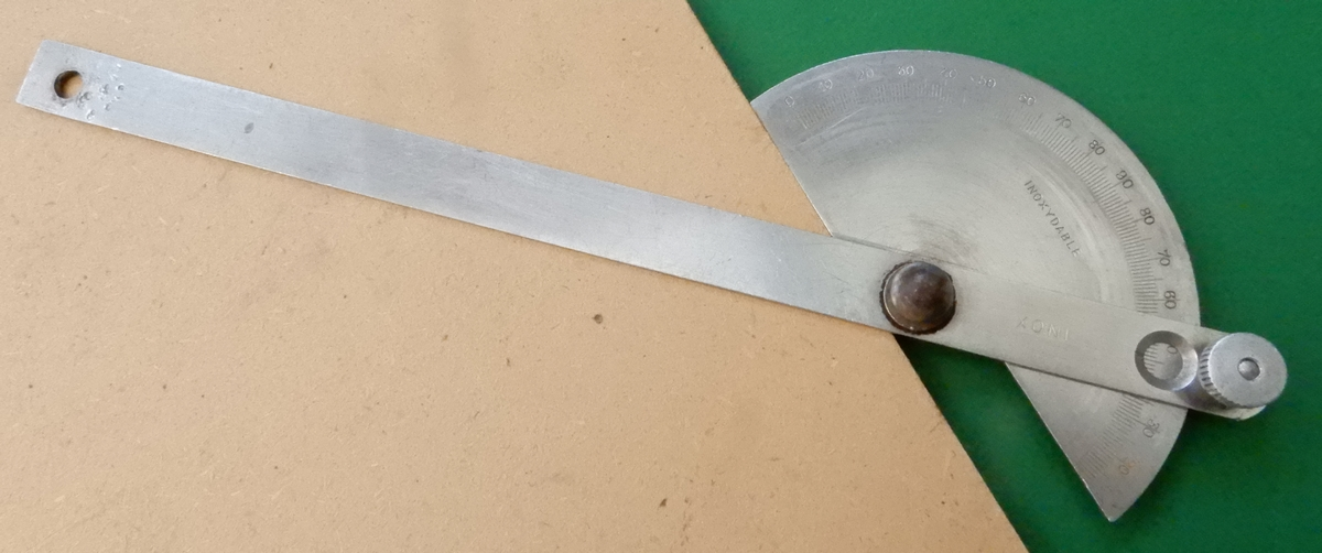 Rapporteur d'angle utilisé par les artisans ou dans l'industrie